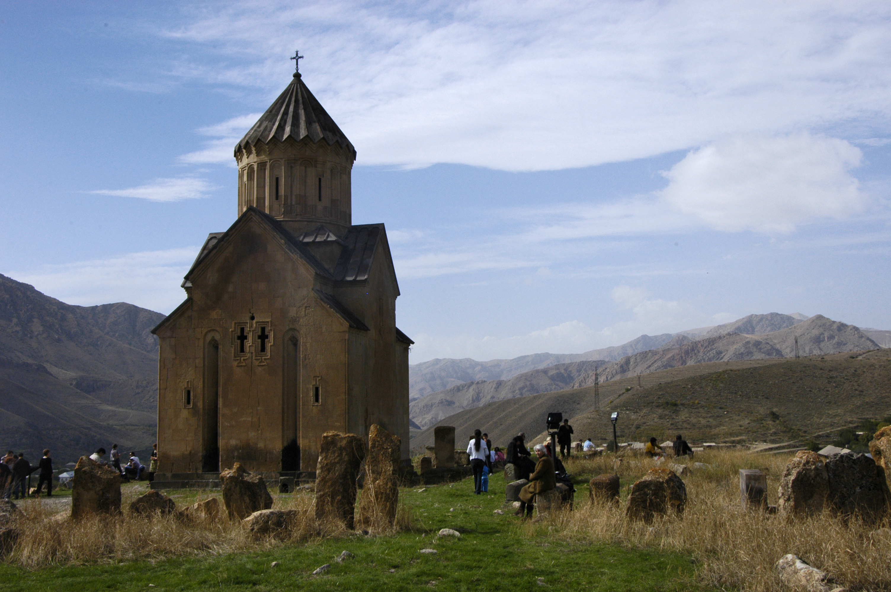 Արենիի Սուրբ Աստվածածին եկեղեցի ճարտ.՝ Մոմիկ, պատվիրատու՝ Սյունյաց եպիսկոպոս Հովհաննես վրկնգ.՝ 1967-1969թթ 8/3.1